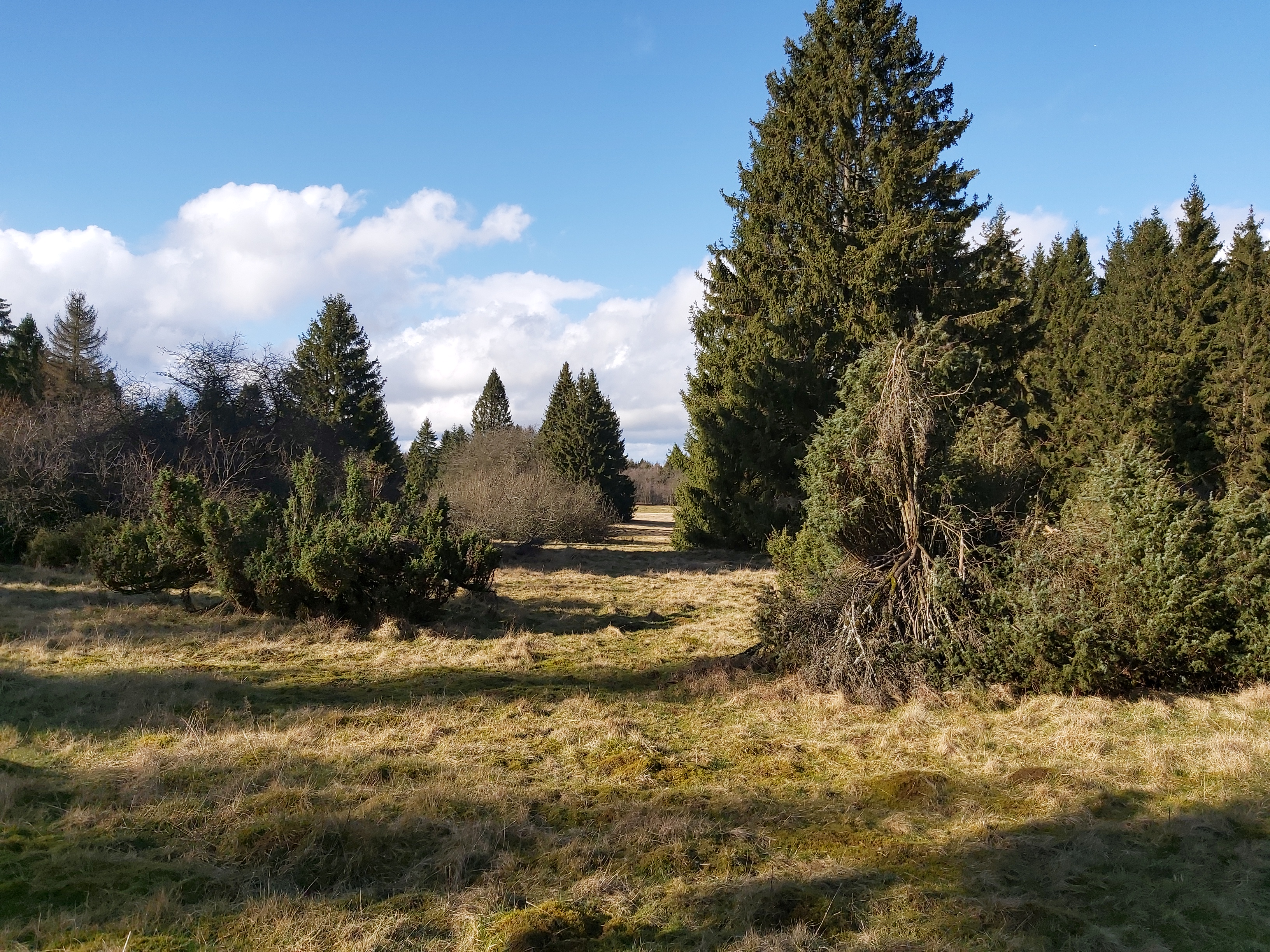 Die Wacholderheide bei Westernohe ist ein Naturschutzgebiet, mit Wachholdersträuchern.